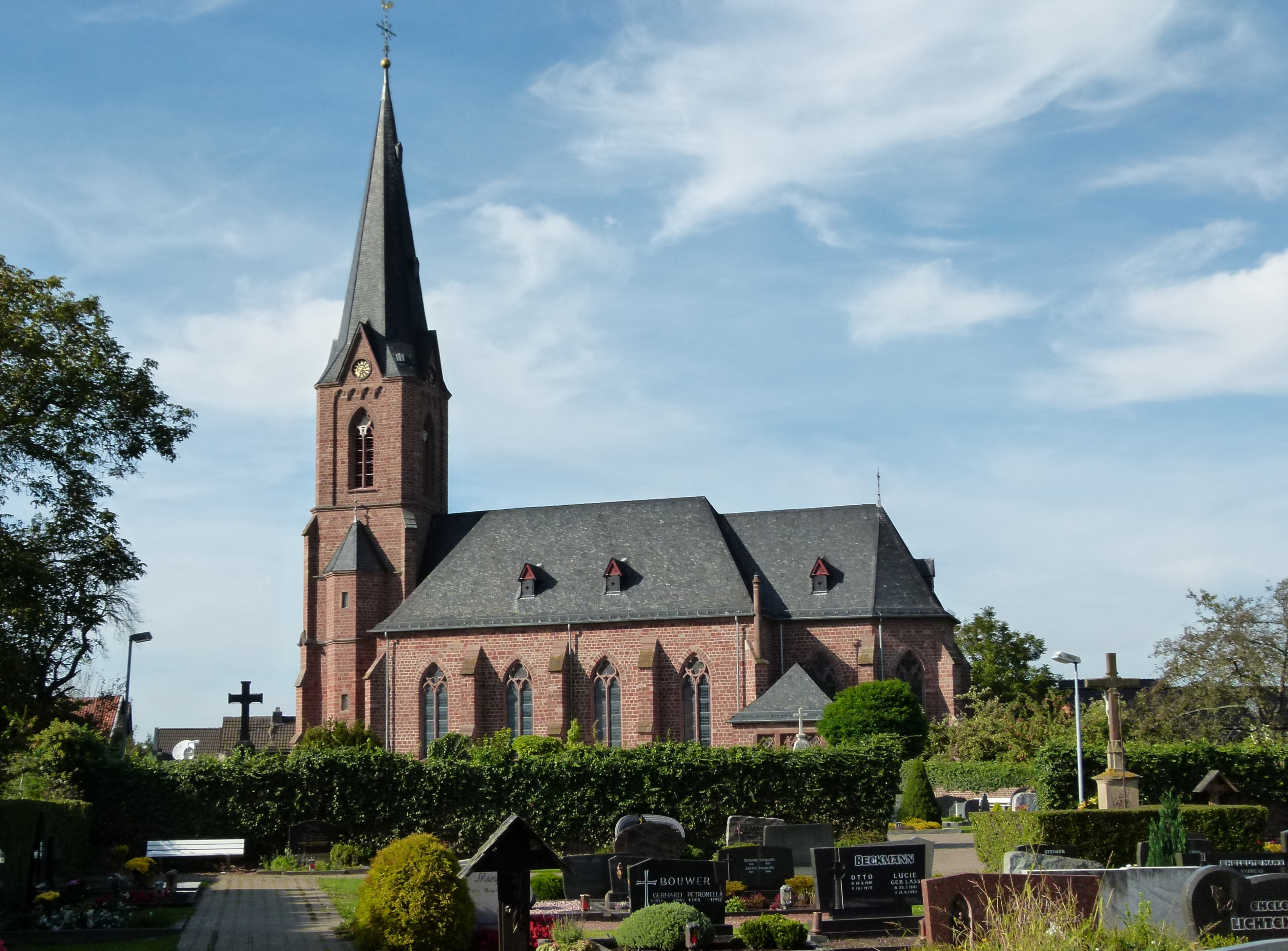 Katholische Pfarrkirche Obergartzem